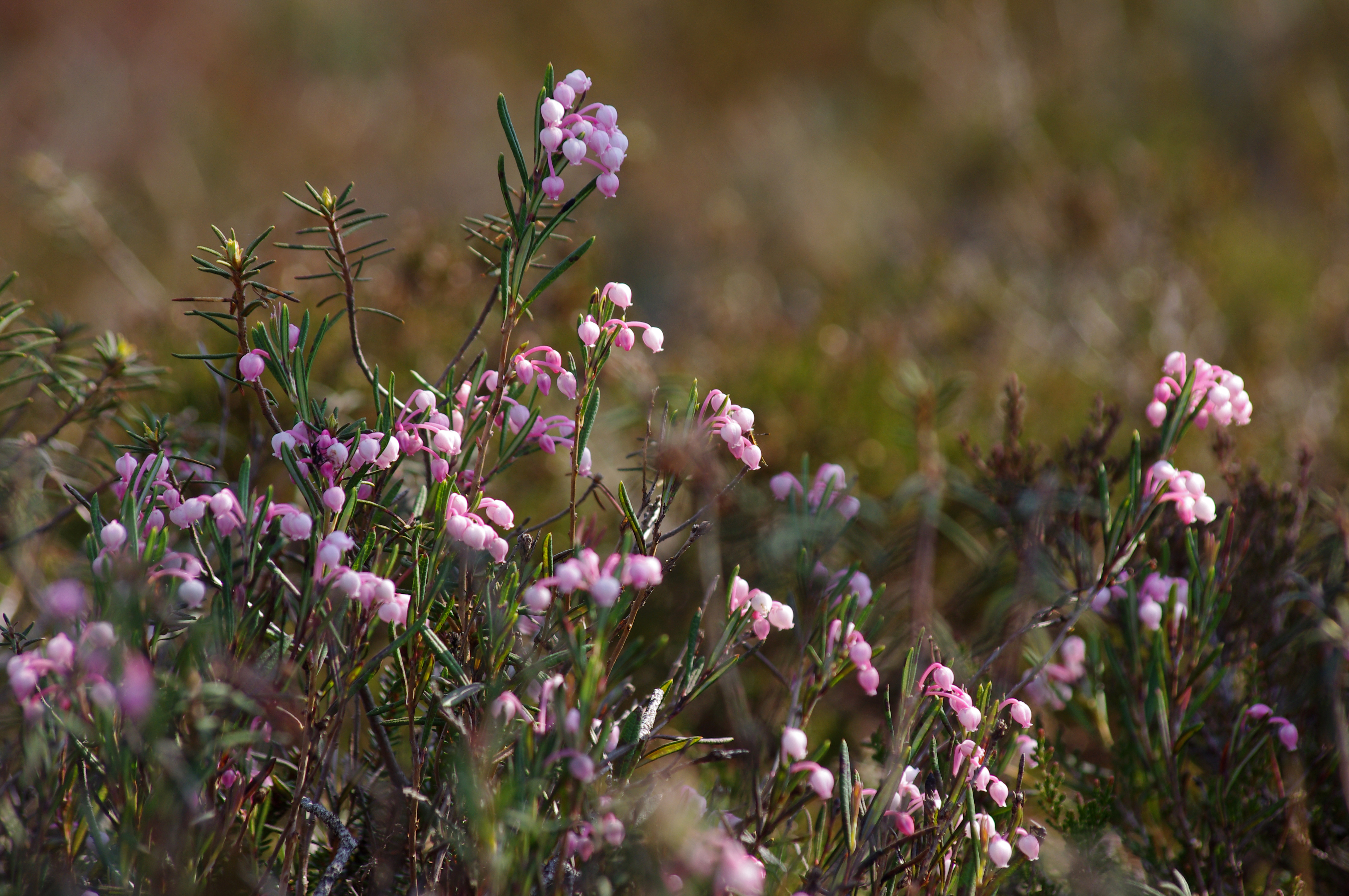 Õitsev küüvits Kakerdaja rabas 20. mail 2011